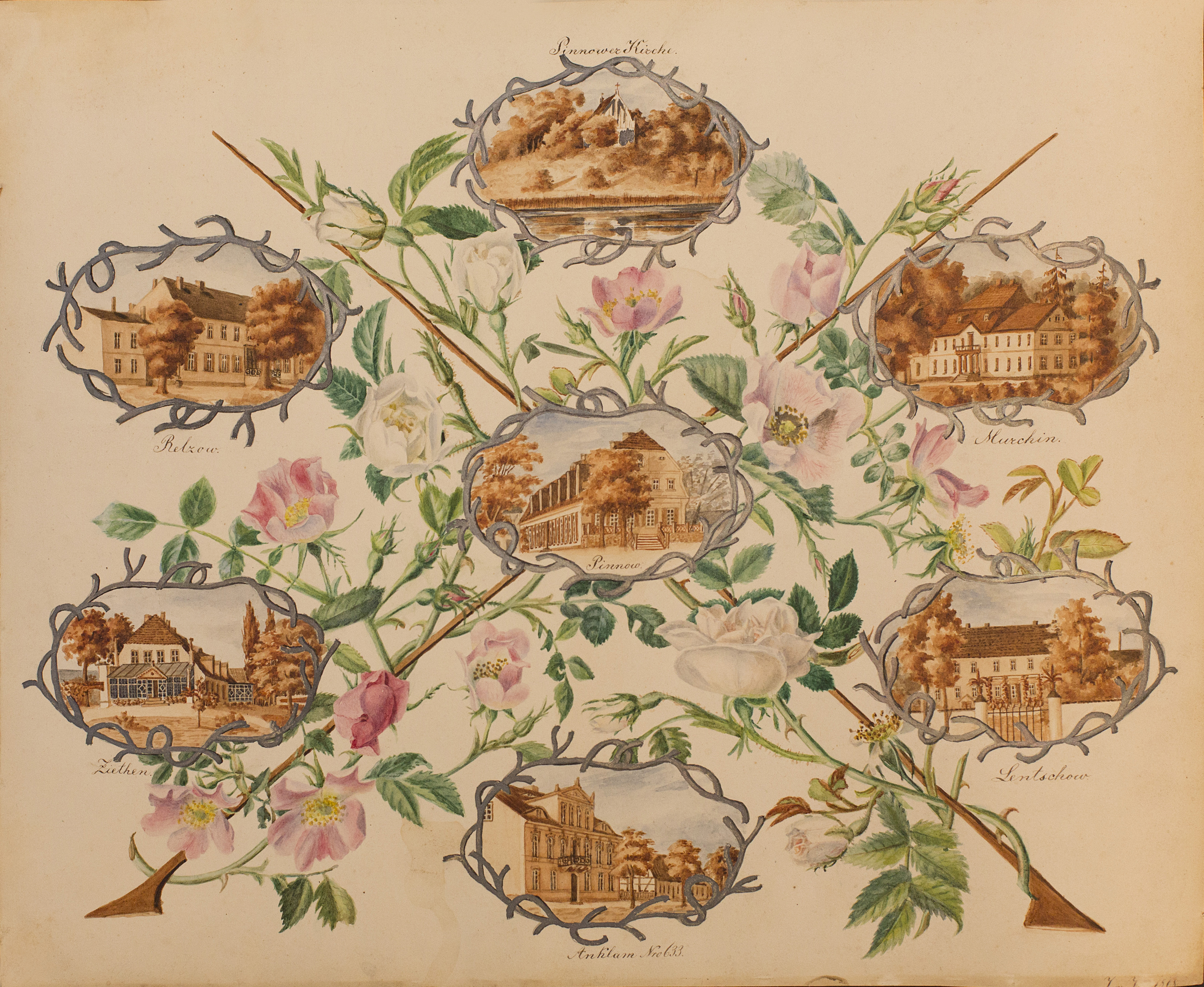 Gemälde von Julie von Buddenbrock d. J.; 1868